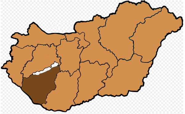 Mappa dell'arcidiocesi cattolica di Kaposvar, in Ungheria. Lavoro personale eseguito da questa immagine di Commons.